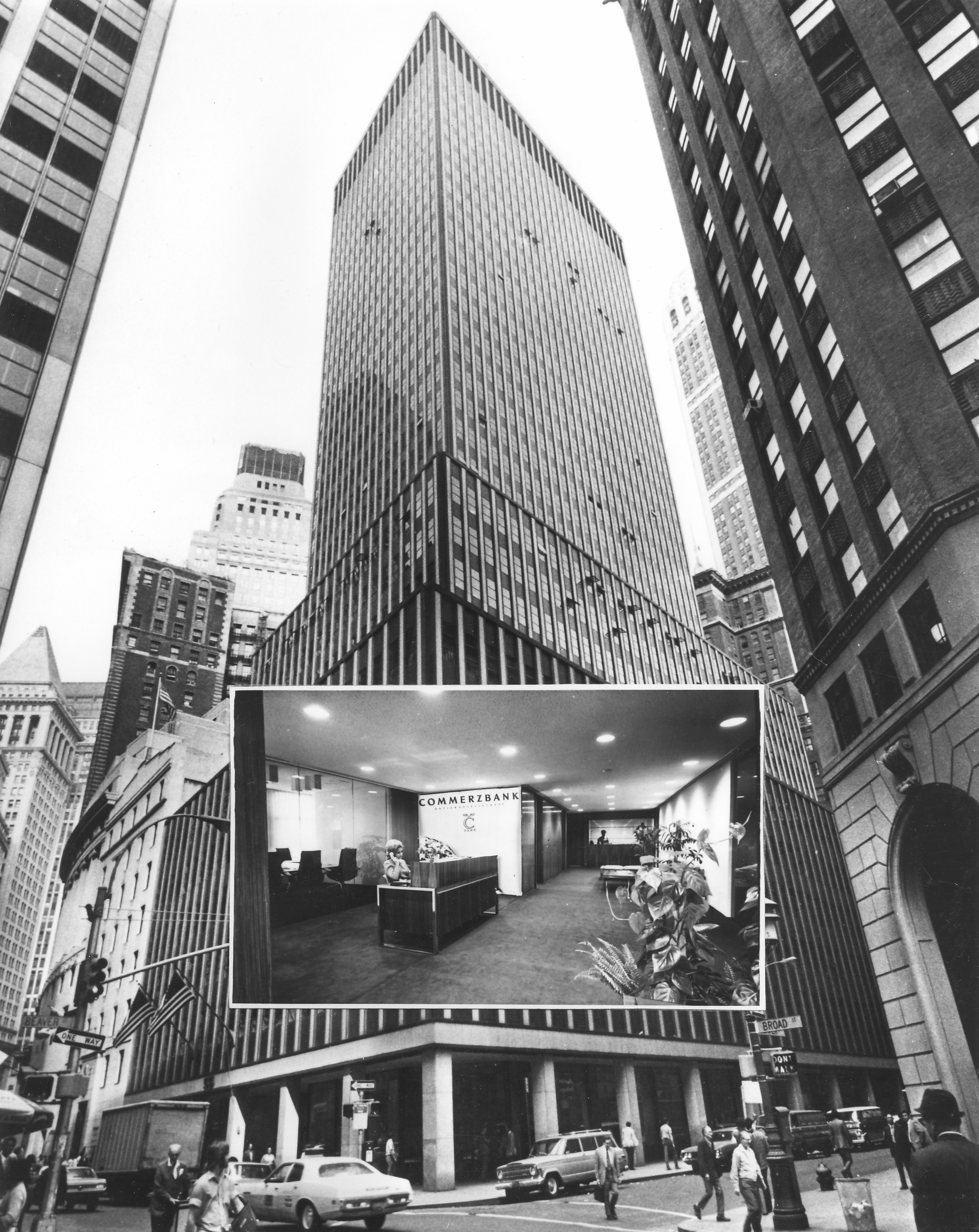 1971 New York Commerzbank-Filiale